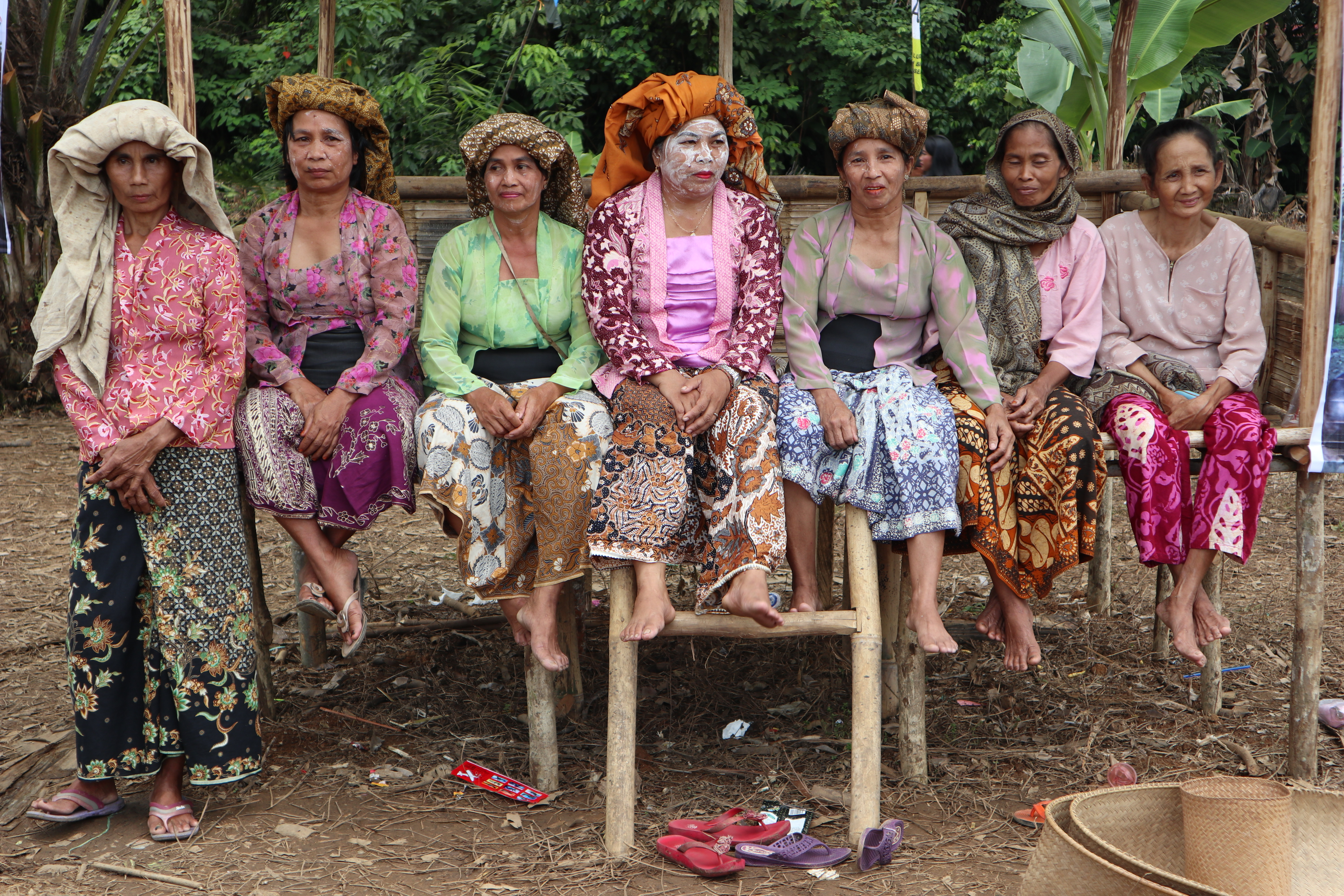 Para wanita dari suku Dayak Halong, Kalimantan Selatan.